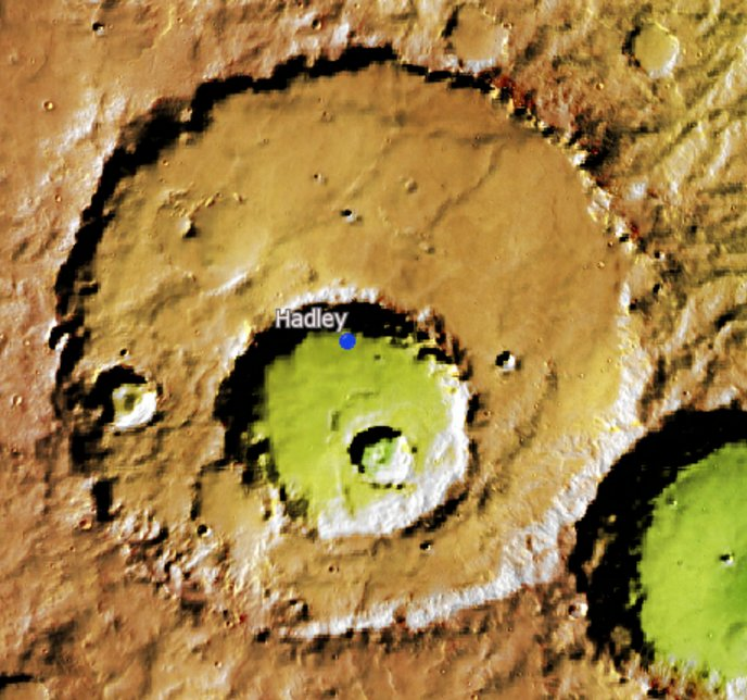 Cráter marciano Hadley. (Imagen IAU/USGS/Goddard/A SU/USGS)